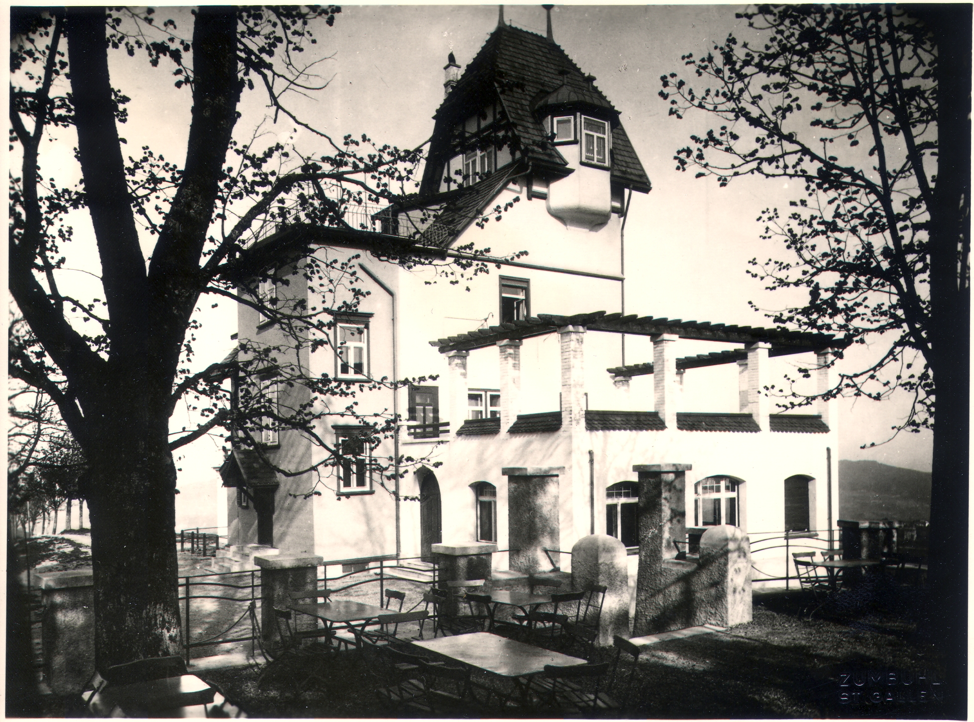 Restaurant Freudenberg, abgebrochen 1956, St. Gallen, Aufnahme 1900 - 1910